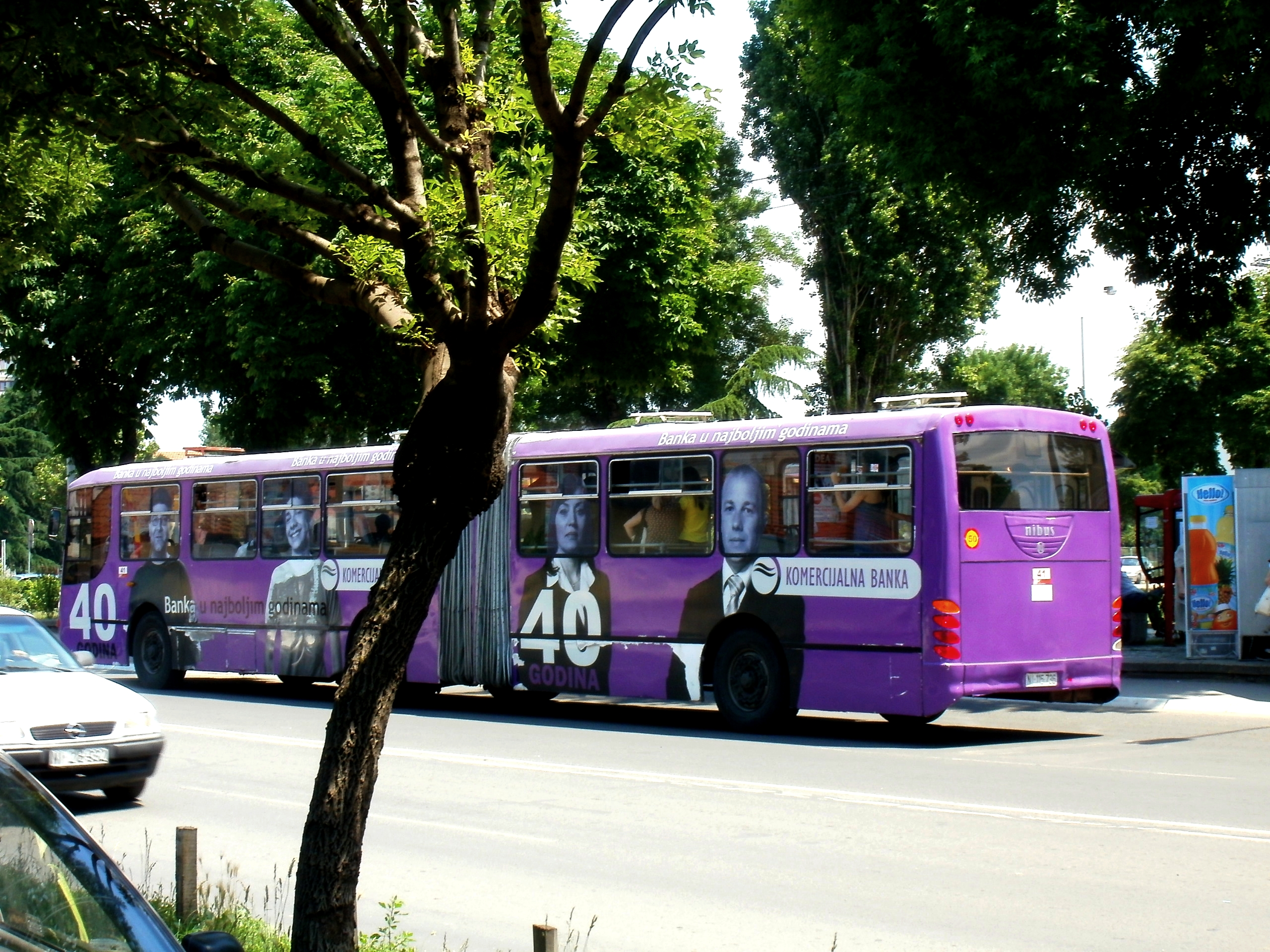 Autobus u Nišu.